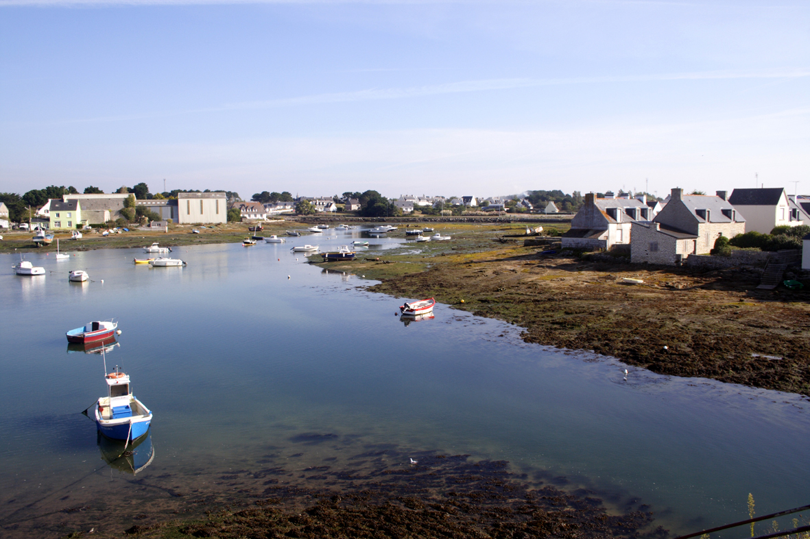 Arrière-port Guilvinec Arrière-port Guilvinec vu du haut du pont